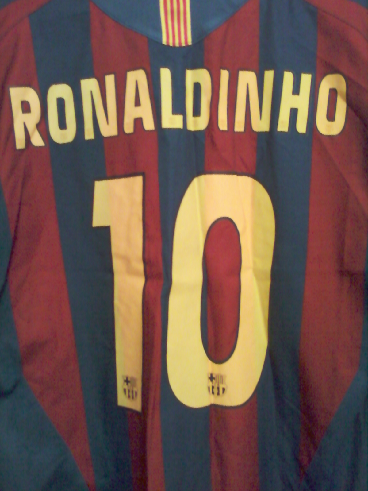 Maillot domicile de Ronaldinho au FC Barcelone 2005-2006